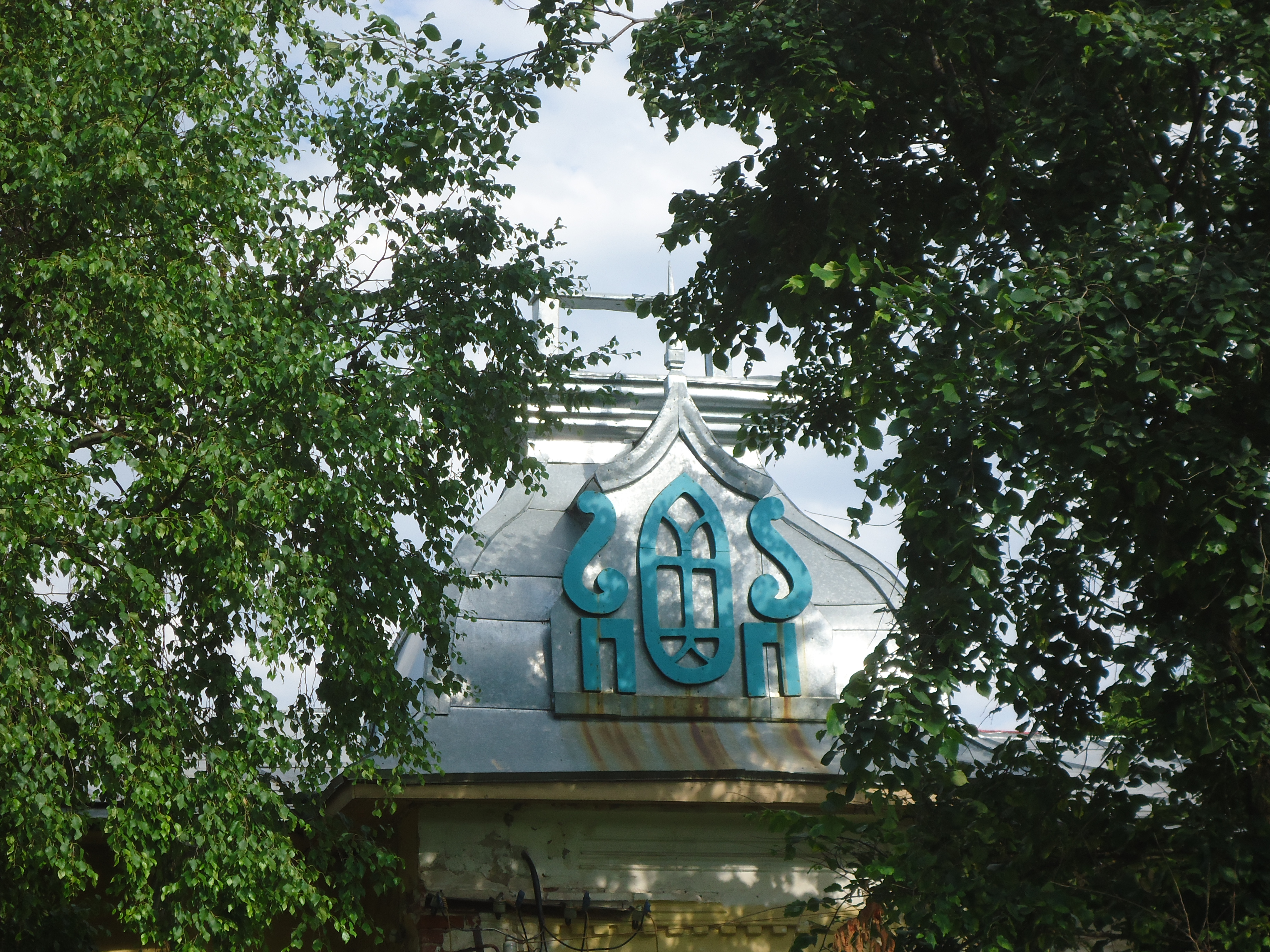 Эмблема над центральным входом: улица Карла Маркса, 67, Грязовец, Вологодская область